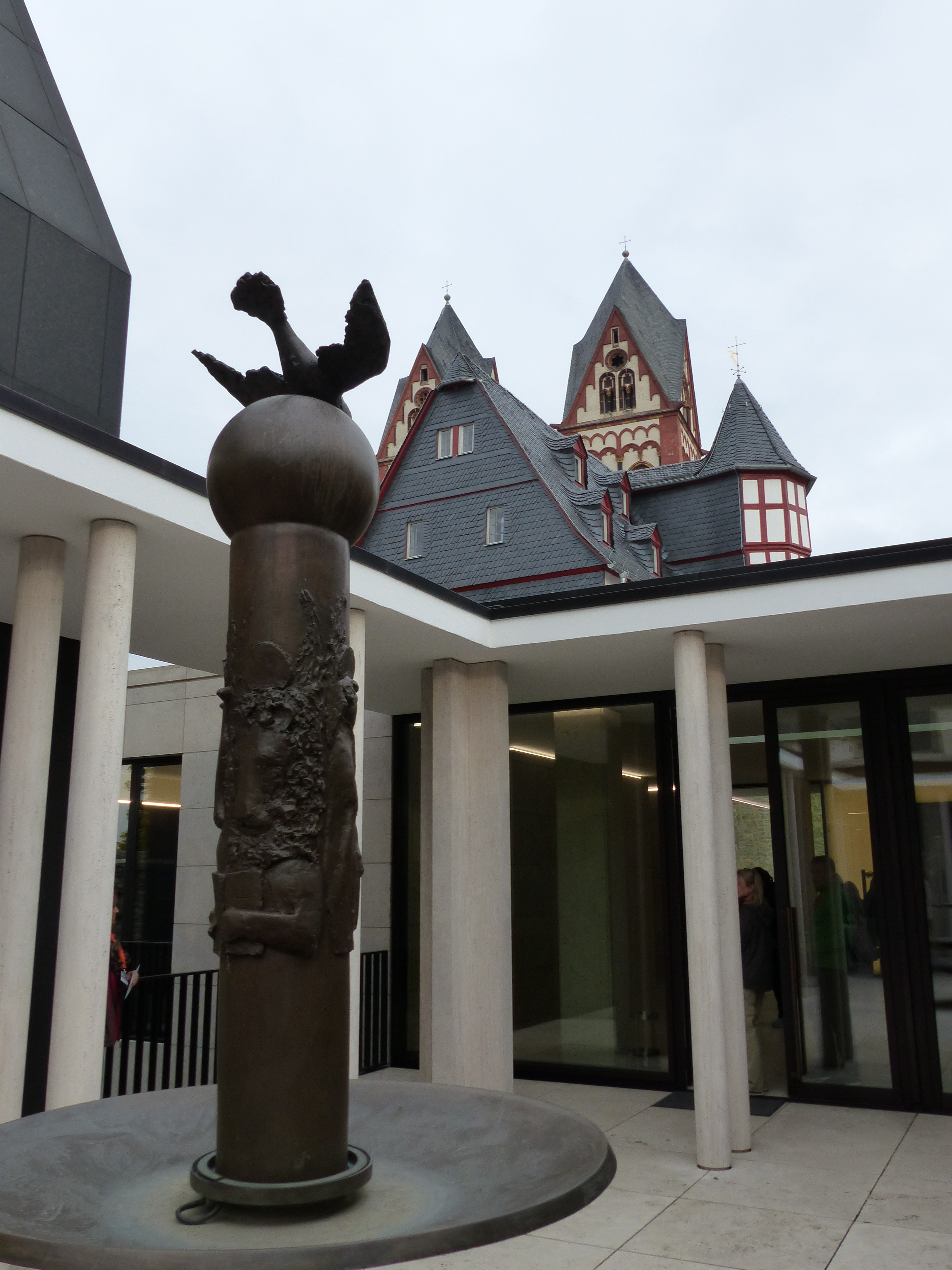 Brunnen im Innenhof des Limburger Bischofssitzes (Hintergrund: Alte Vikarie und Dom)